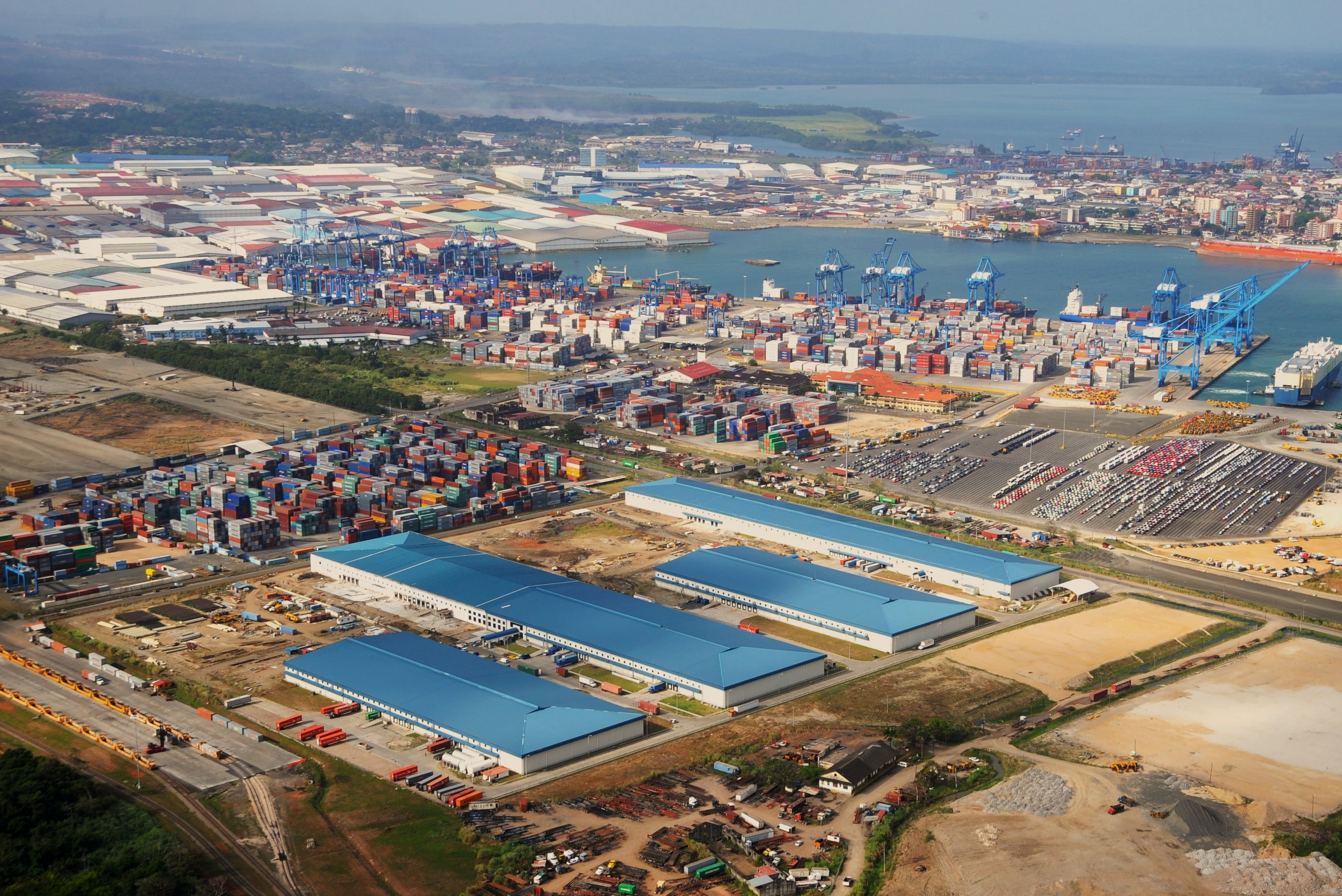 Zona Libre de Colón - Colón Free Trade Zone